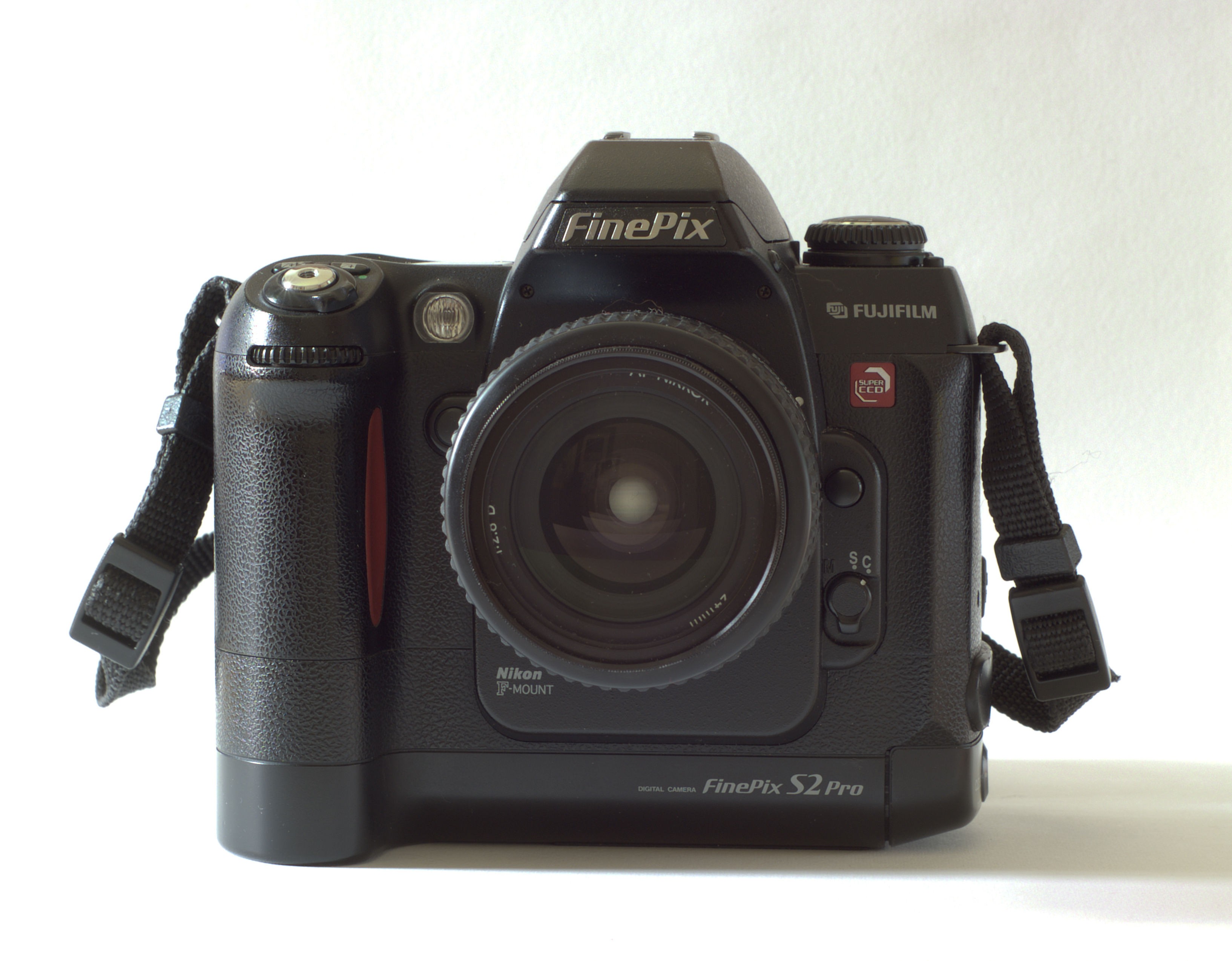 Fuji Finepix S2 pro , Vorderansicht